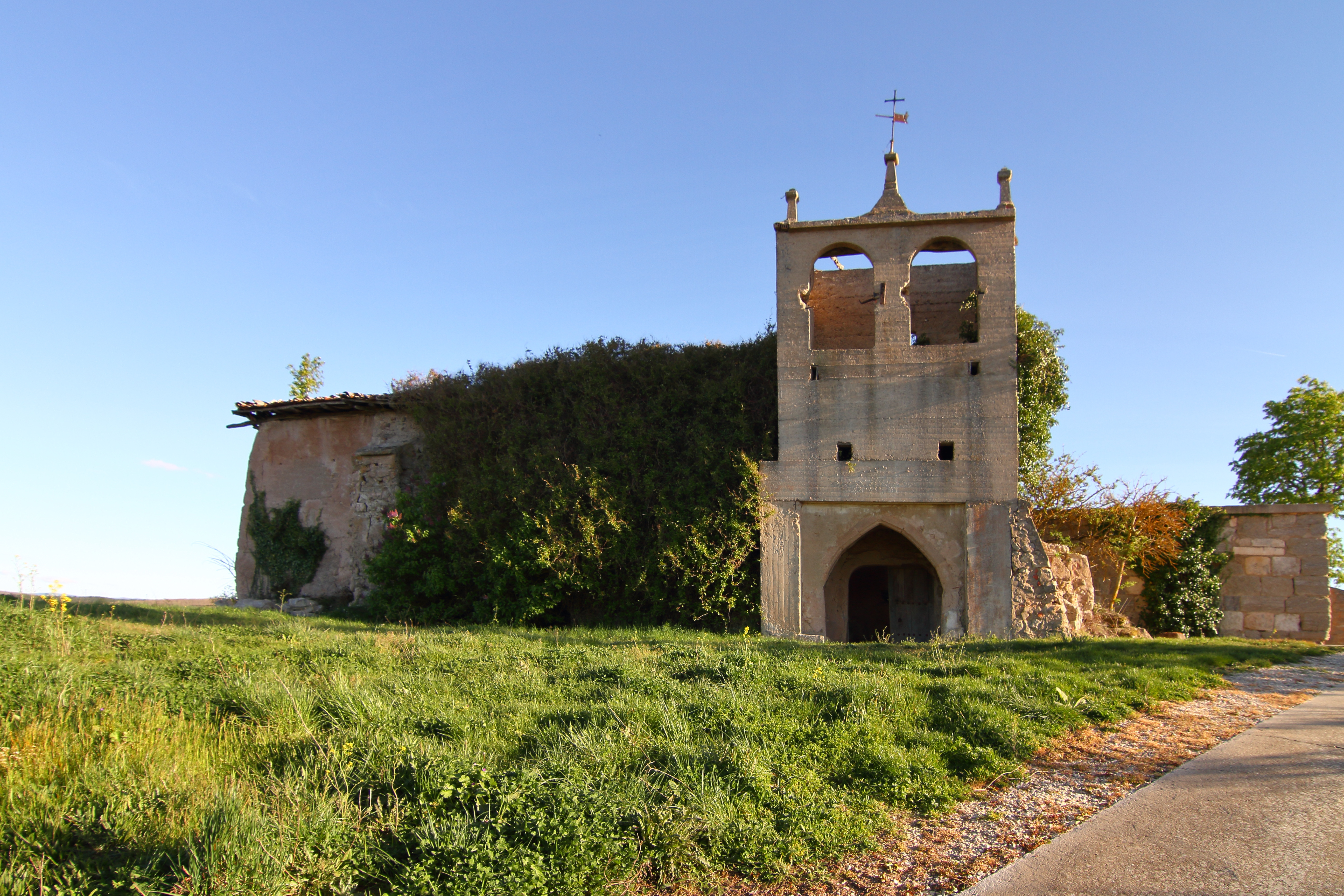 Cerratón de Juarros, antigua iglesia, 03